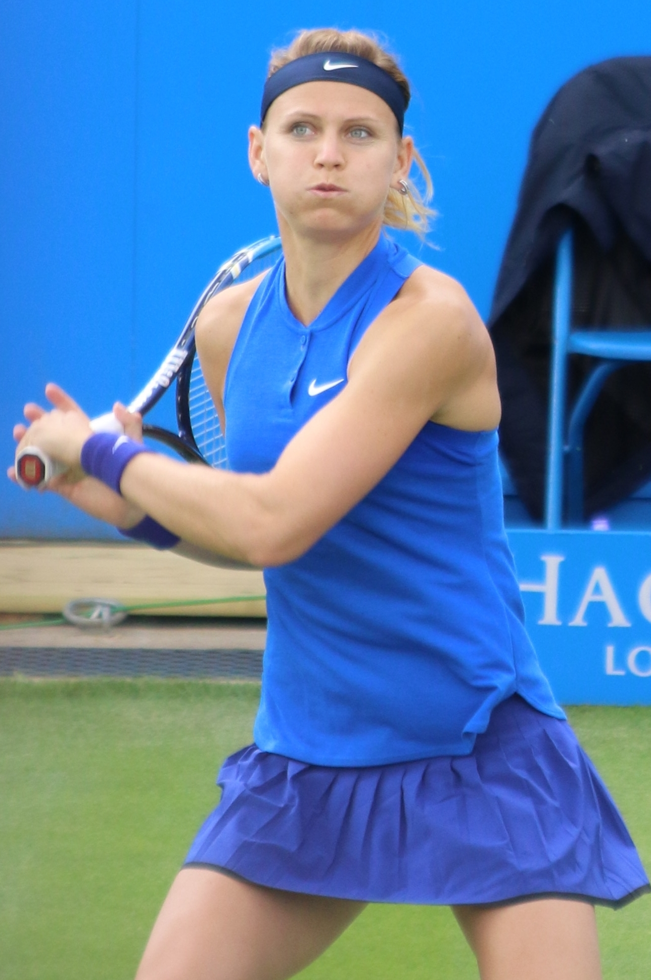 Safarova BM16 (1)